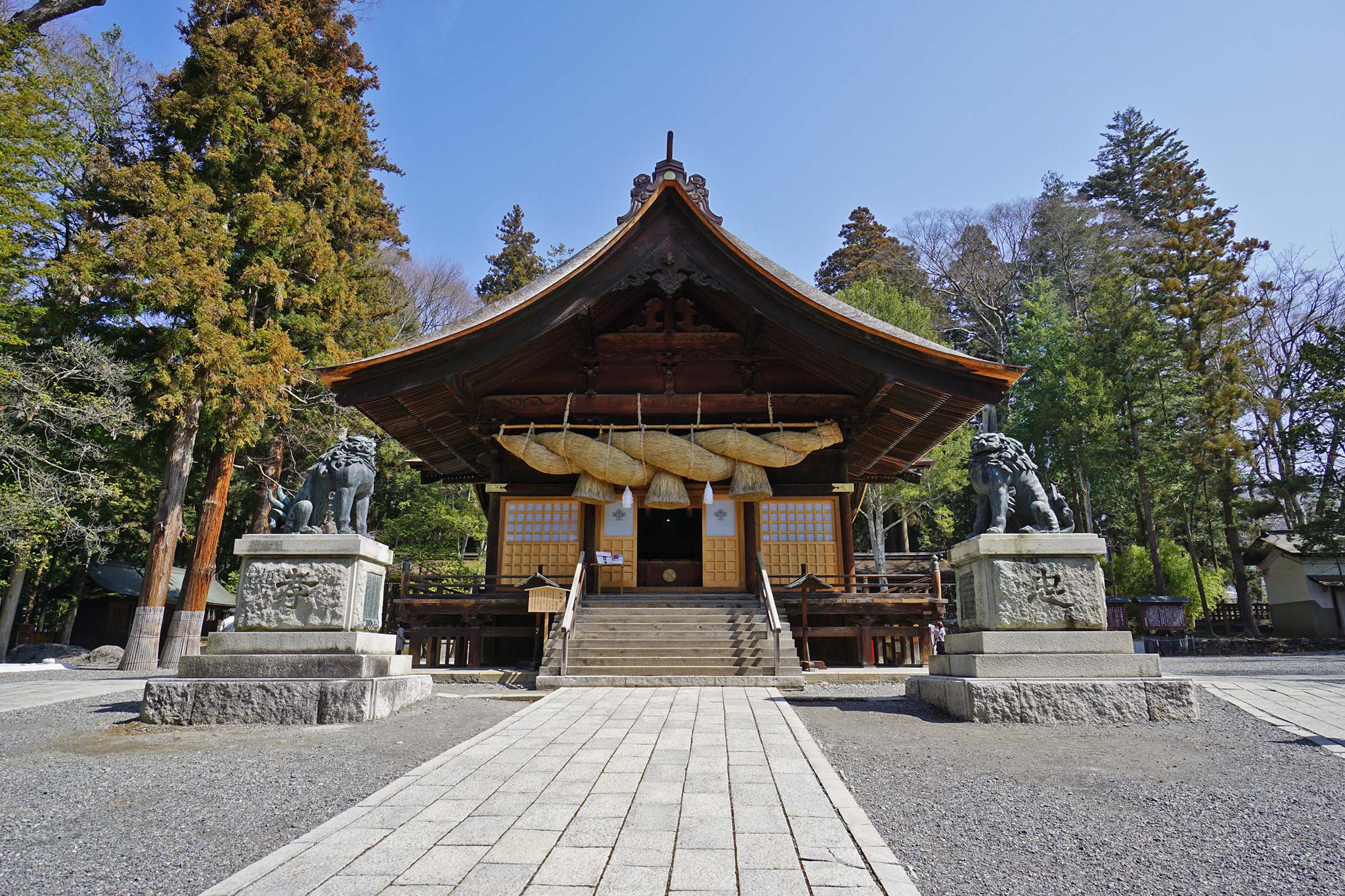 Suwa taisha Shimosha Akimiya , 諏訪大社 下社 秋宮